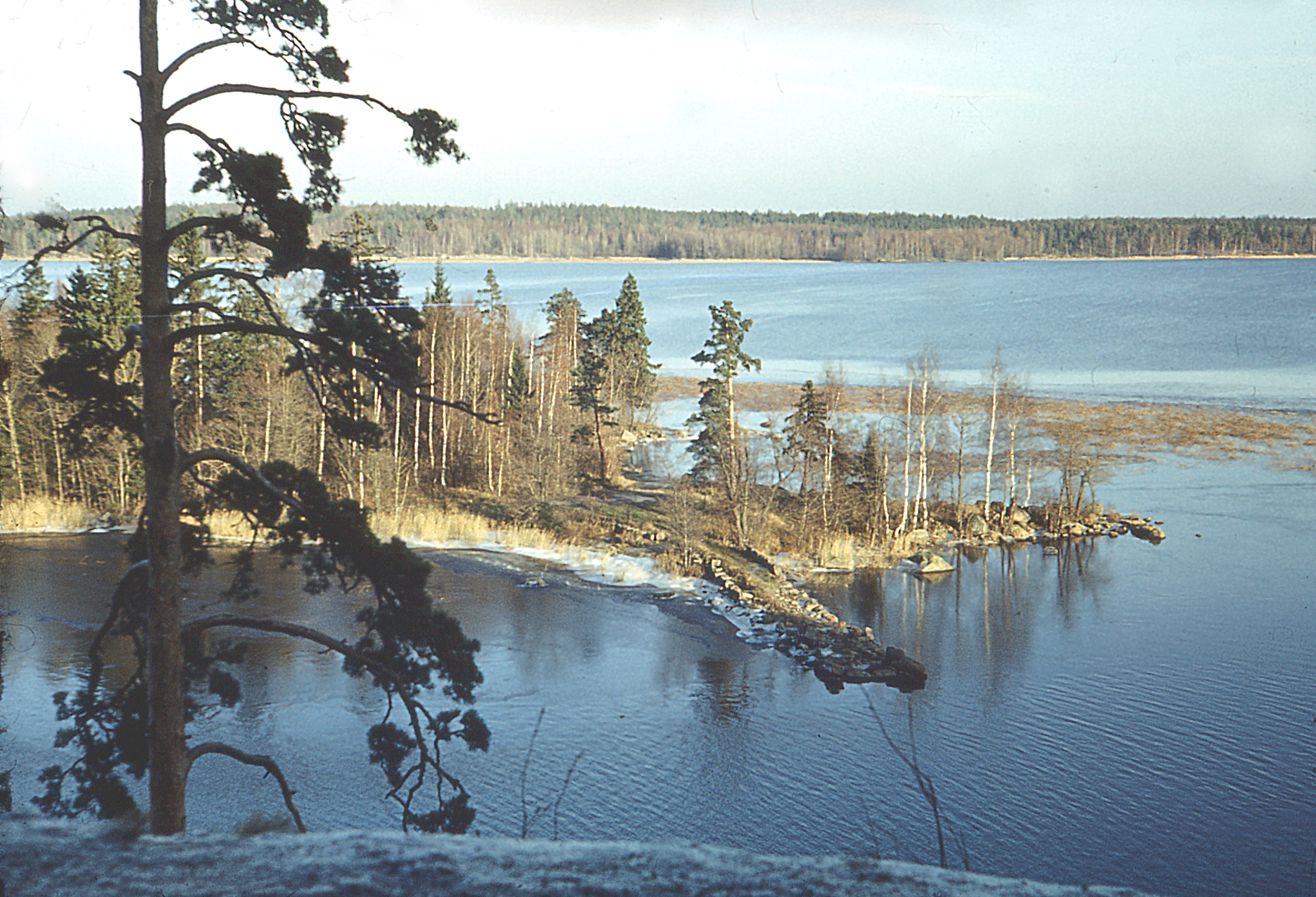 Вид со скал в дальней части парка Монрепо на бухту Защитную